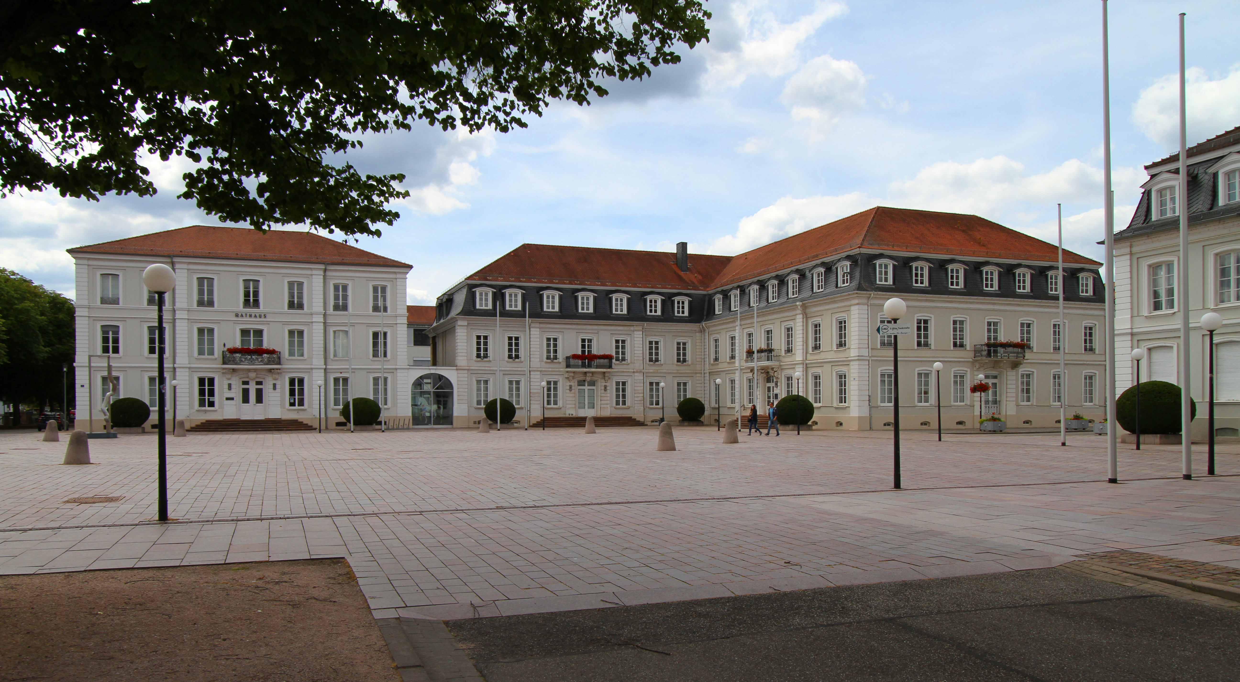 Herzogplatz in Zweibrücken